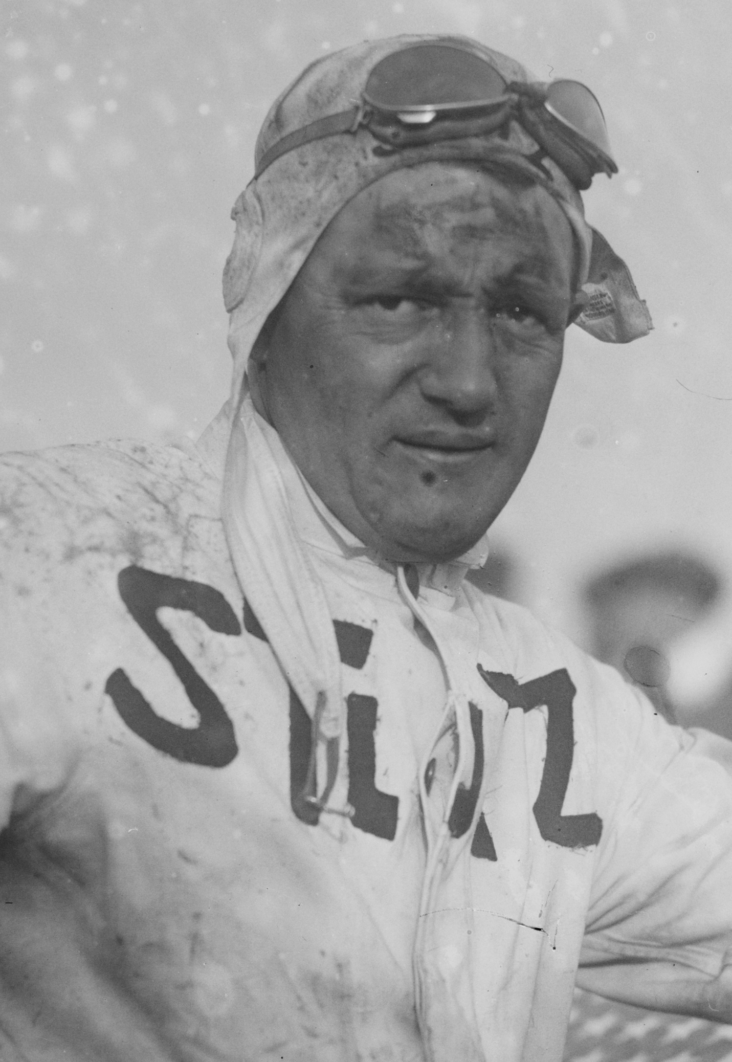 Gil Andersen (Norwegian-American racecar driver) in 1910s